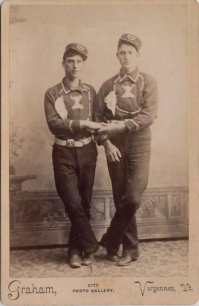 Male Couple, Firemen from Vergennes VT, USA